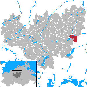 Alt Sührkow in Mecklenburg-Vorpommern - District Güstrow